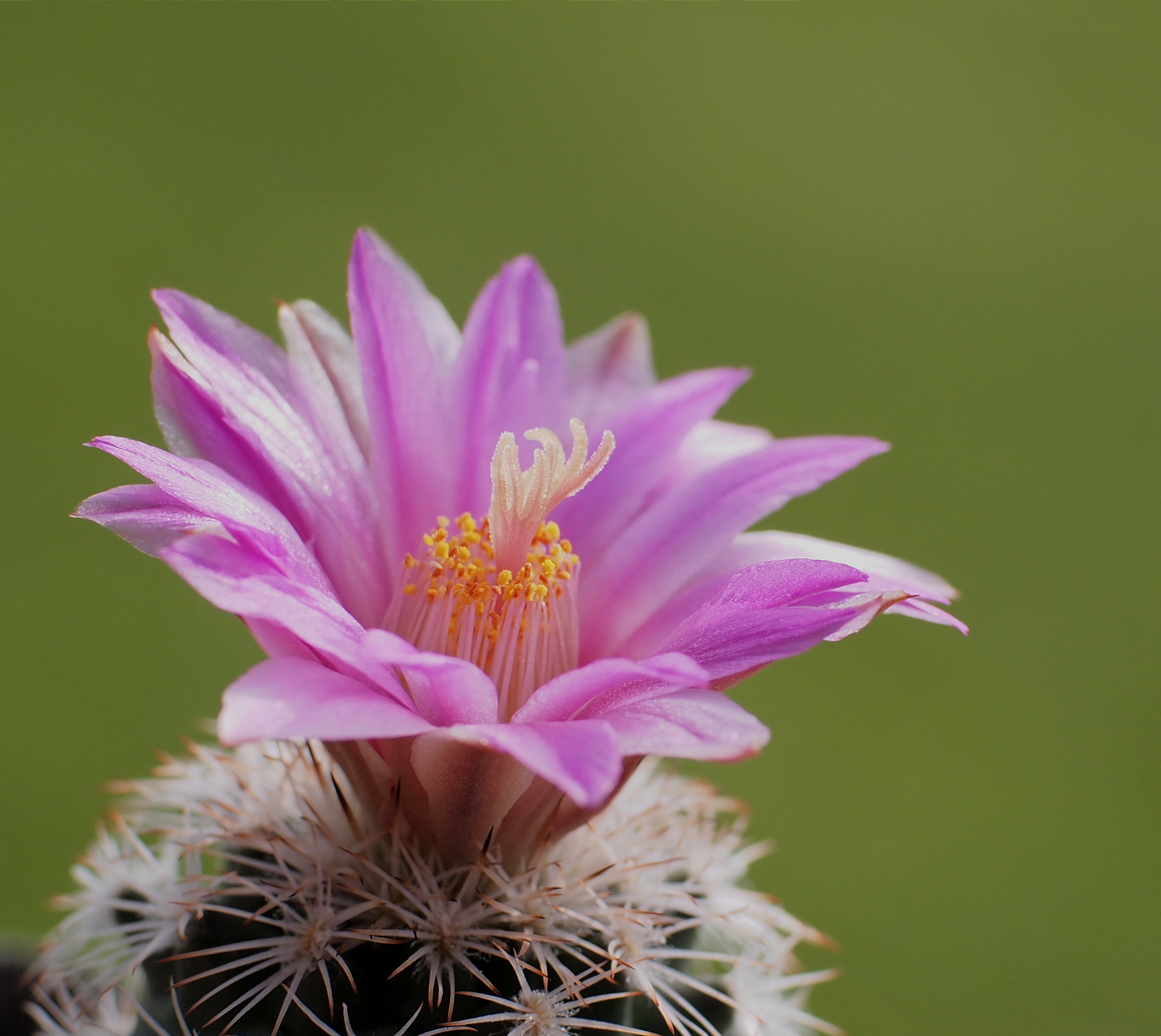 Pen mit CZ Planar 1,7/50 + 12mm Zwischenring